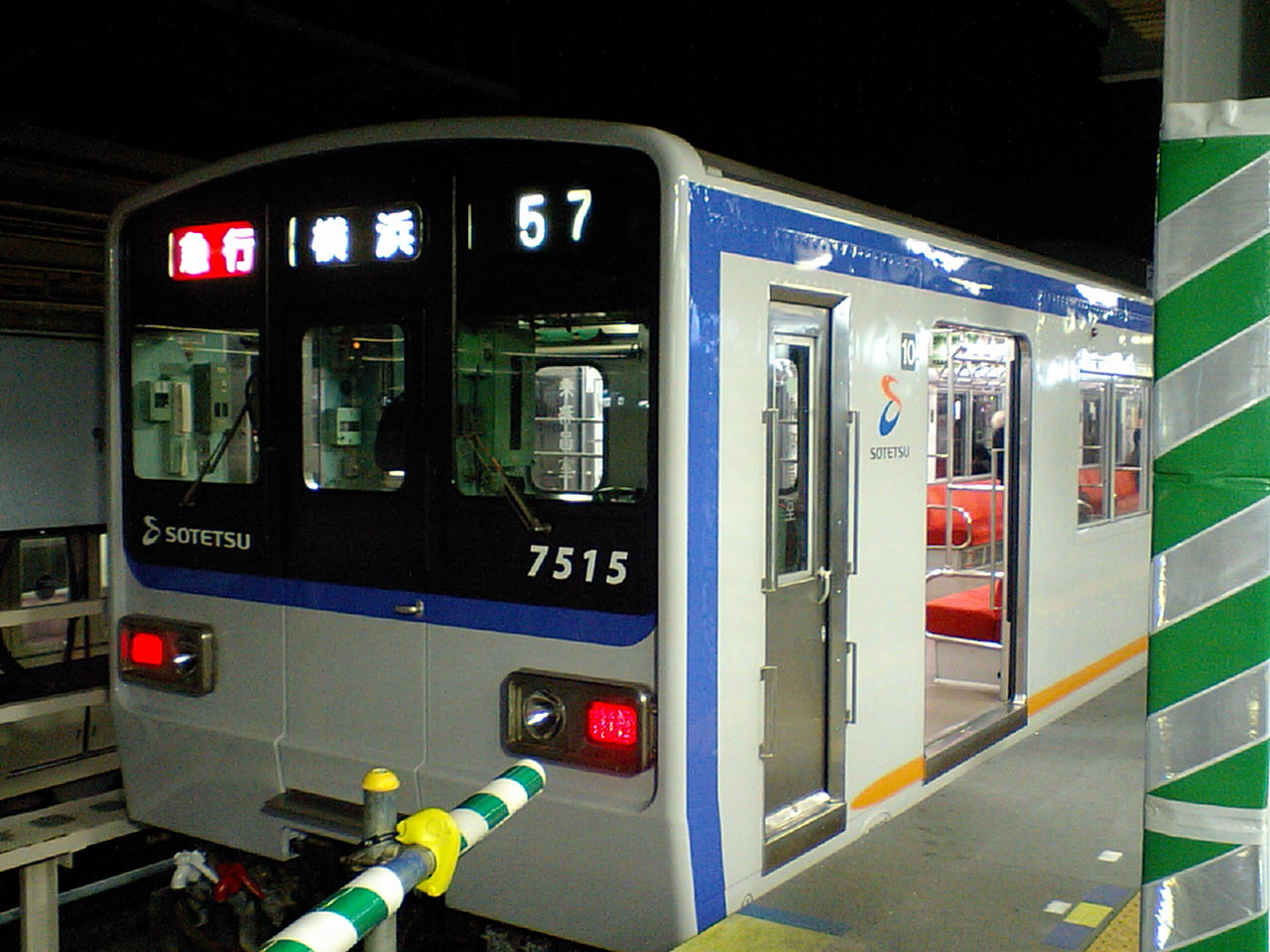 Sotetsu 7000Series Train / 相鉄7000系電車 (新) 2008年版新塗装